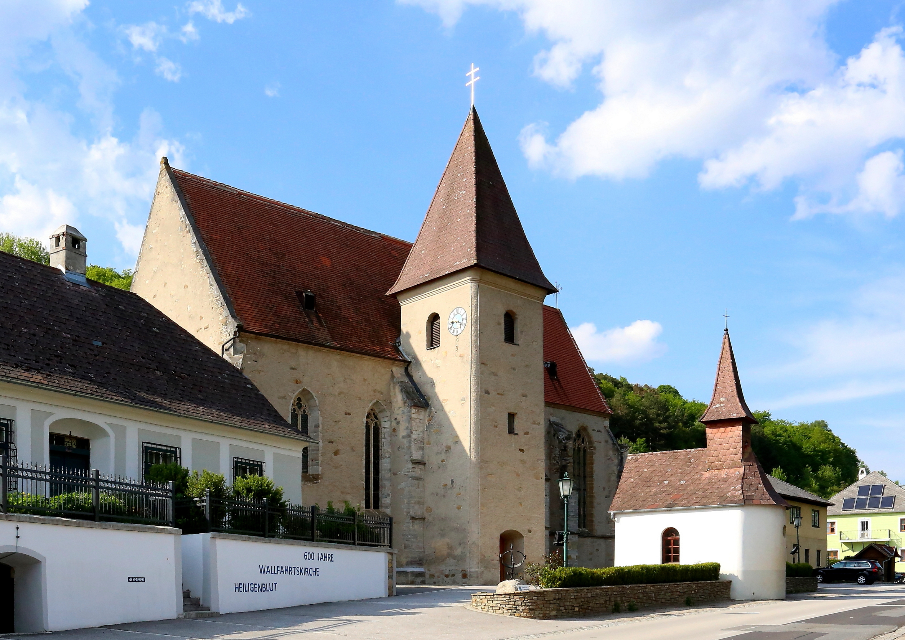 Katholische Pfarrkirche hl. Andreas in Heiligenblut, ein Ortsteil der niederösterreichischen Marktgemeinde Raxendorf, und rechts die sogenannte "Ursprungskapelle".